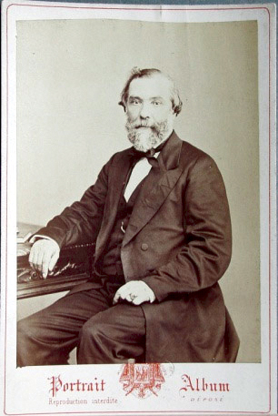 Alphonse Esquiros vers 1869, photo format cabinet série Portrait-Album. Bibliothèque nationale de France, cabinet des estampes.